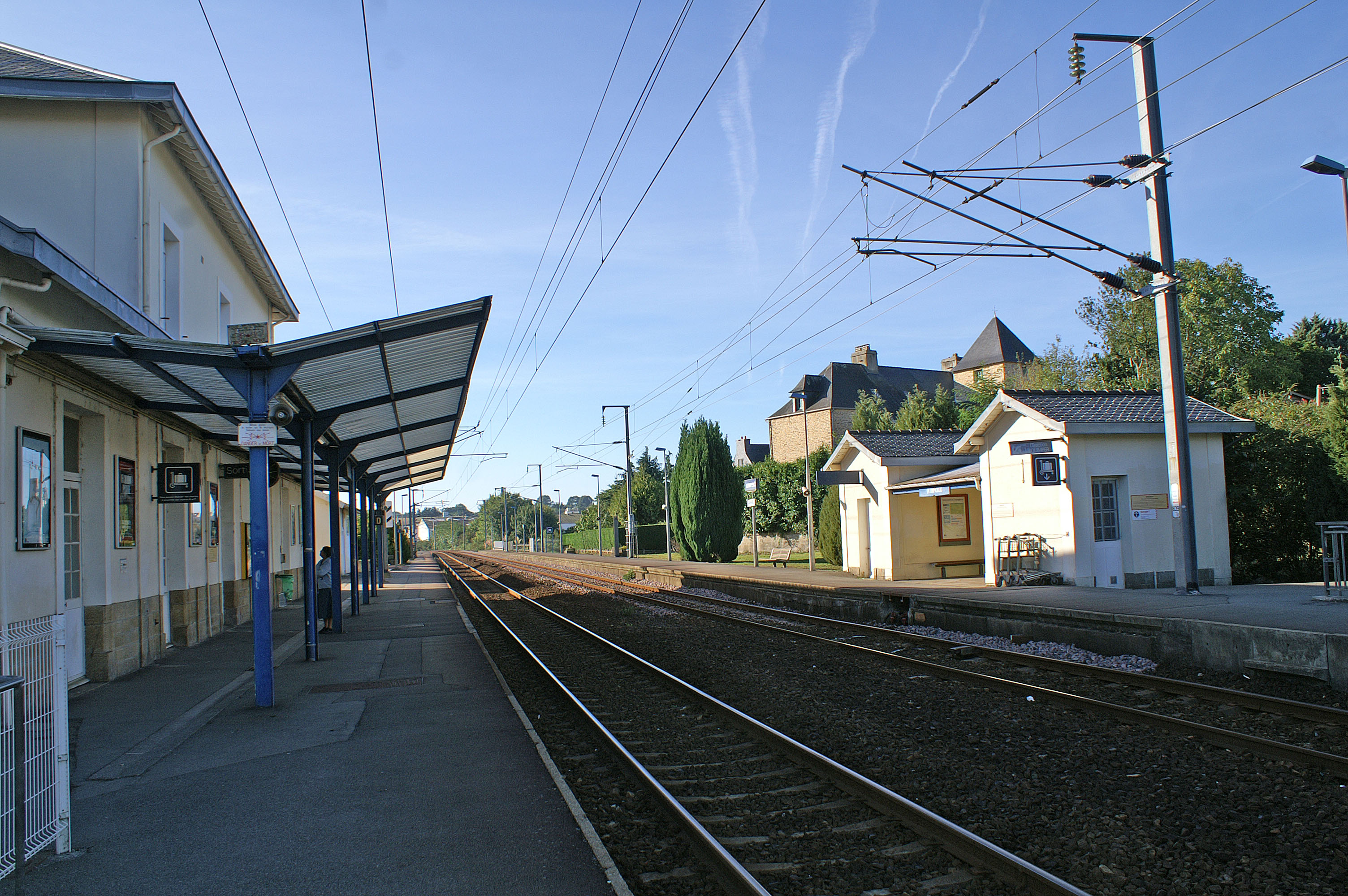 Gare de Quimperlé, vue en direction de Lorient, on aperçoit : à gauche la le bâtiment voyageurs et sa marquise, à droite l'abri de quai, les deux bâtiments sont ceux construit en 1862 par la compagnie du chemin de fer de Paris à Orléans (PO). Une peinture empêche de voir les couleurs caractéristiques des bâtiments de la ligne (alternance de lignes rouges et blanches.